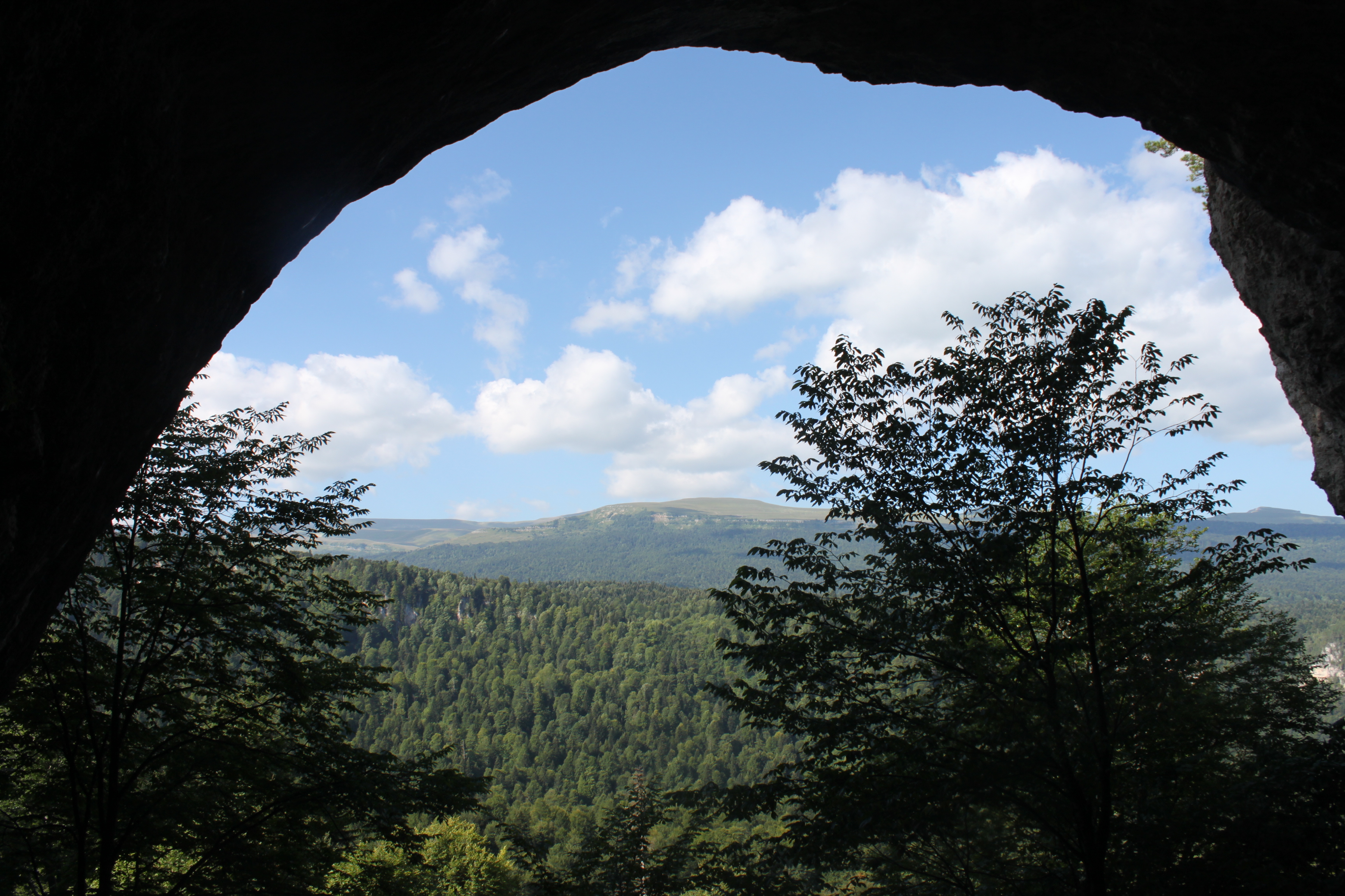 Вид из Мезмайской пещеры на долину р. Сухой Курджипс.